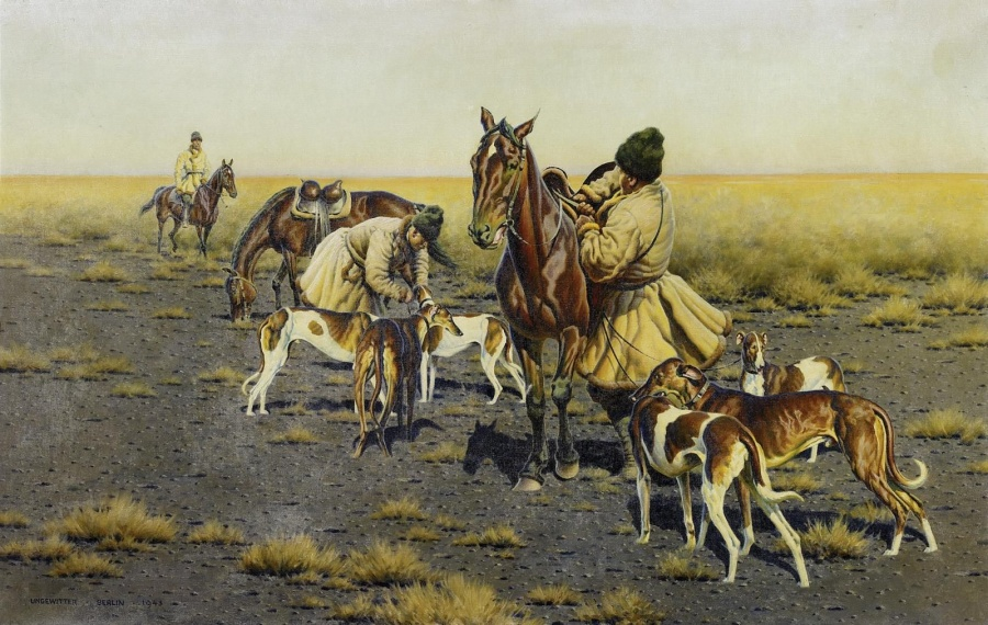 Kosake mit Windhunden